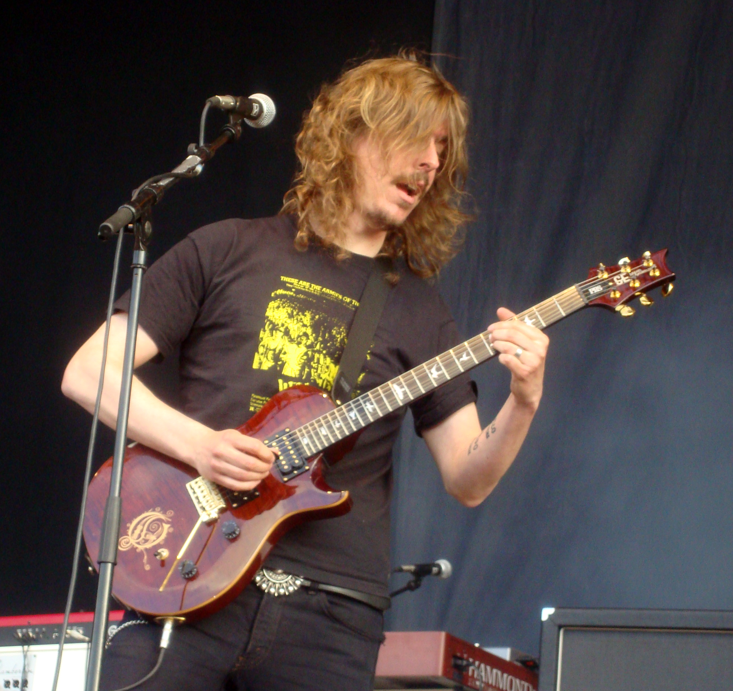 Mikael Åkerfeldt fra den svenske gruppe Opeth under en koncert til Copenhell 2011.